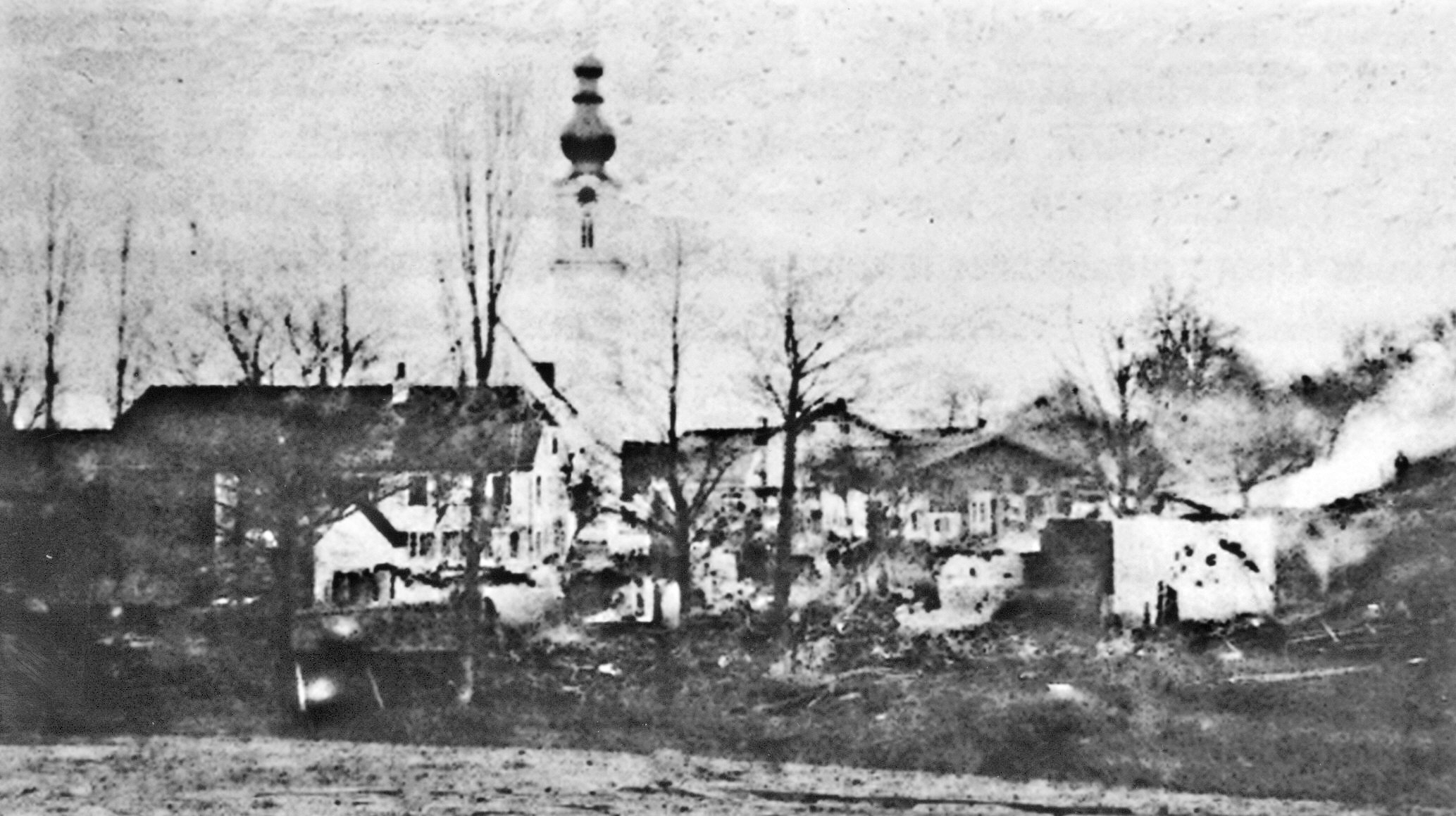 Haunzenbergersöll 1902 Dorfbrand Brand Dorf Häuser Feuer Katastrophe Unglück Rauch Ruine Wiederaufbau Kirche Kirchturm